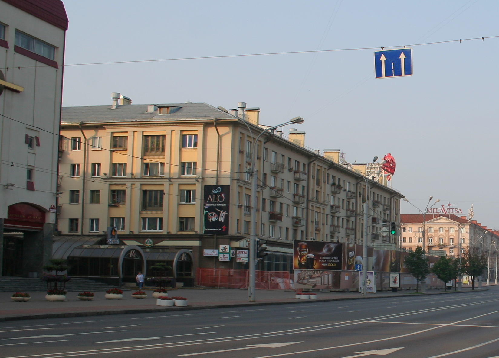 Минск, Белоруссия. Проспект Независимости. Площадь Якуба Коласа.